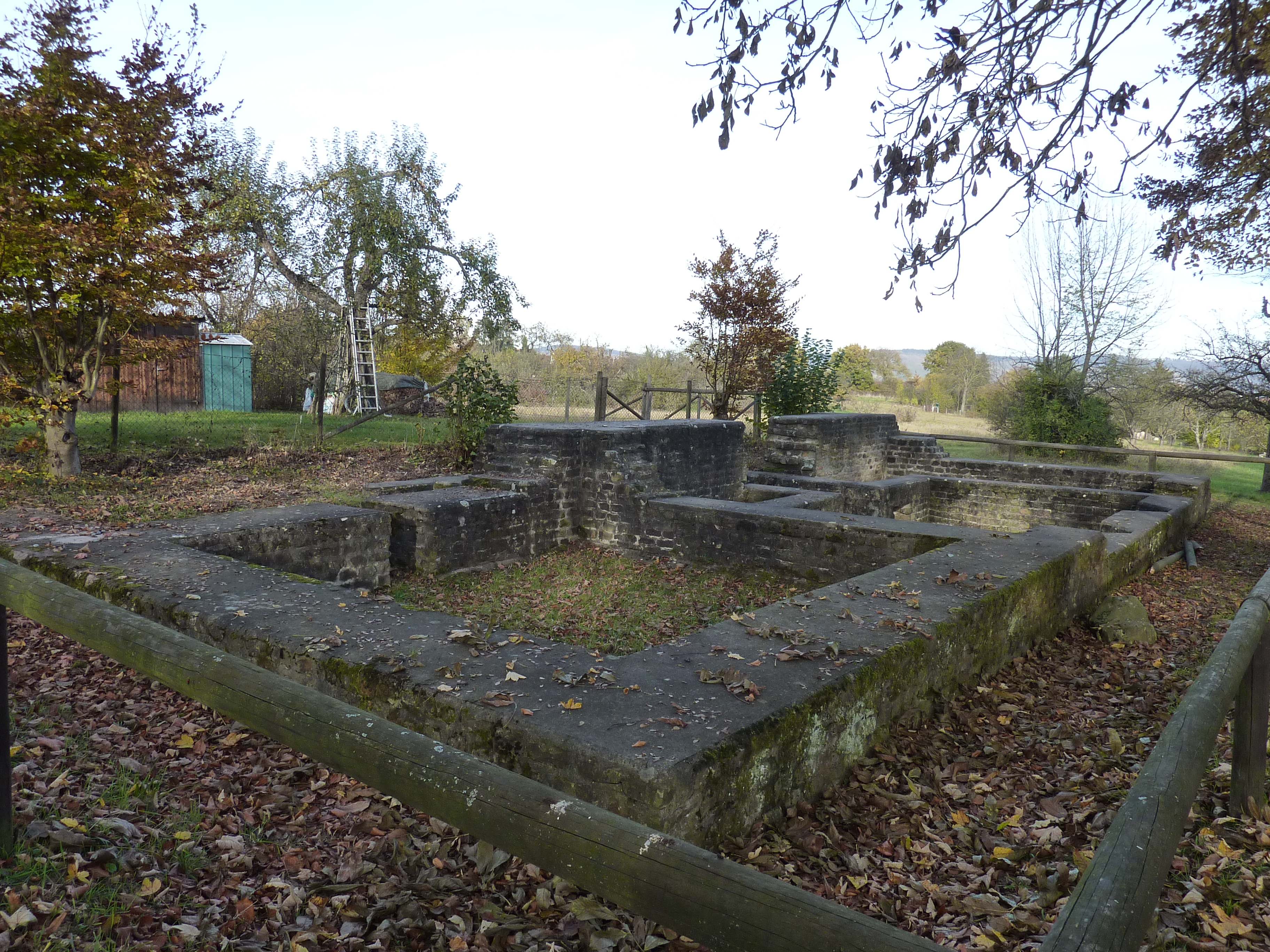 Reste der Villa rustica bei Rommelshausen